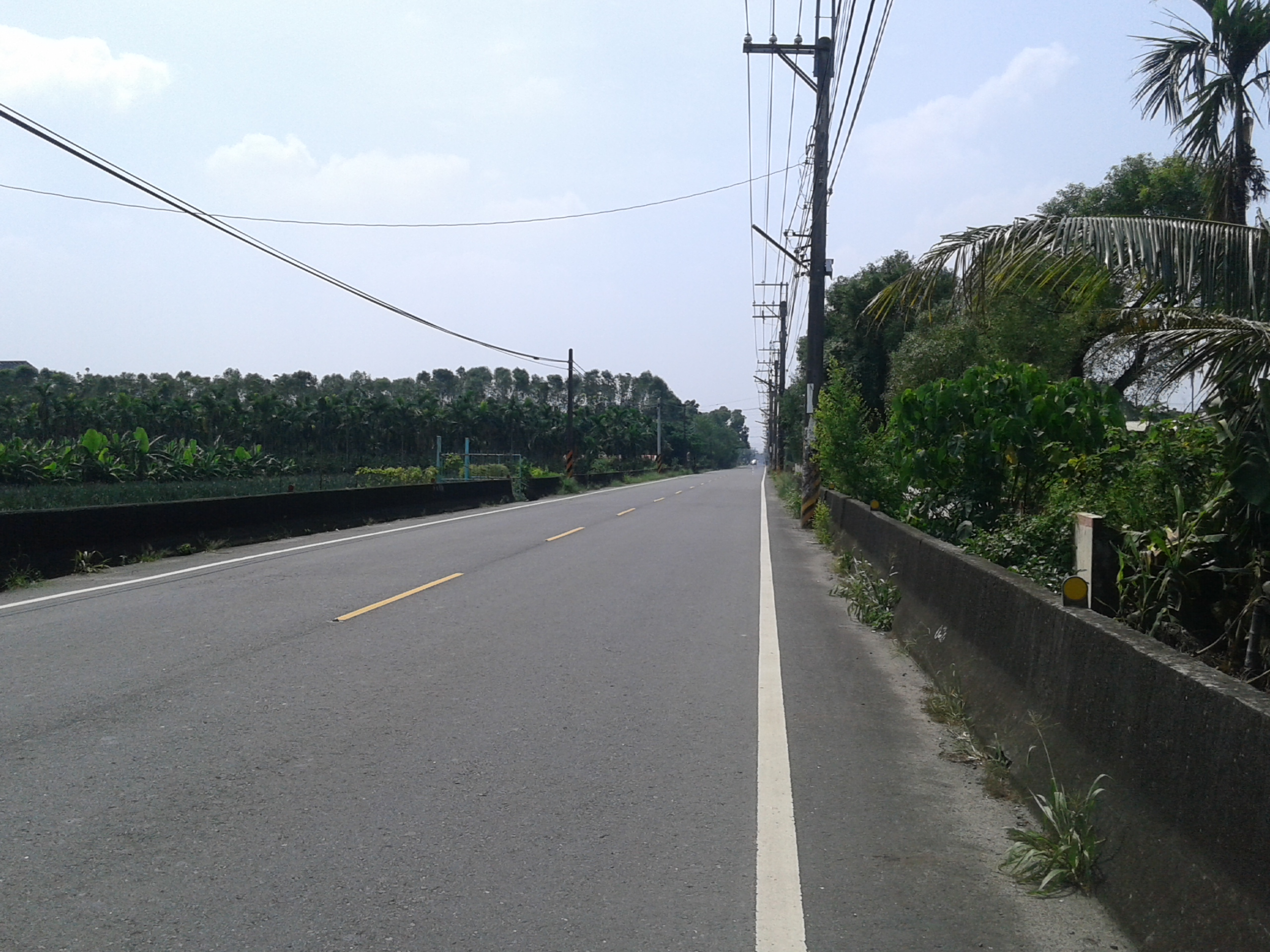 中林路 (縣道187號)